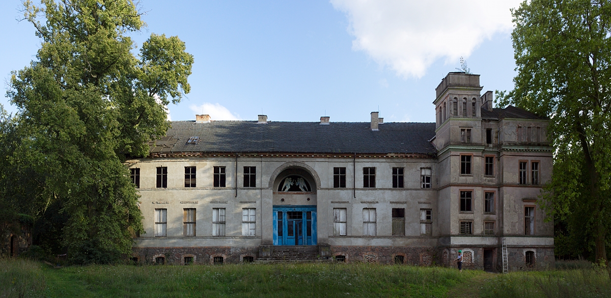 Sosny - dwór z pocz. XIX w. (zabytek nr 2102)